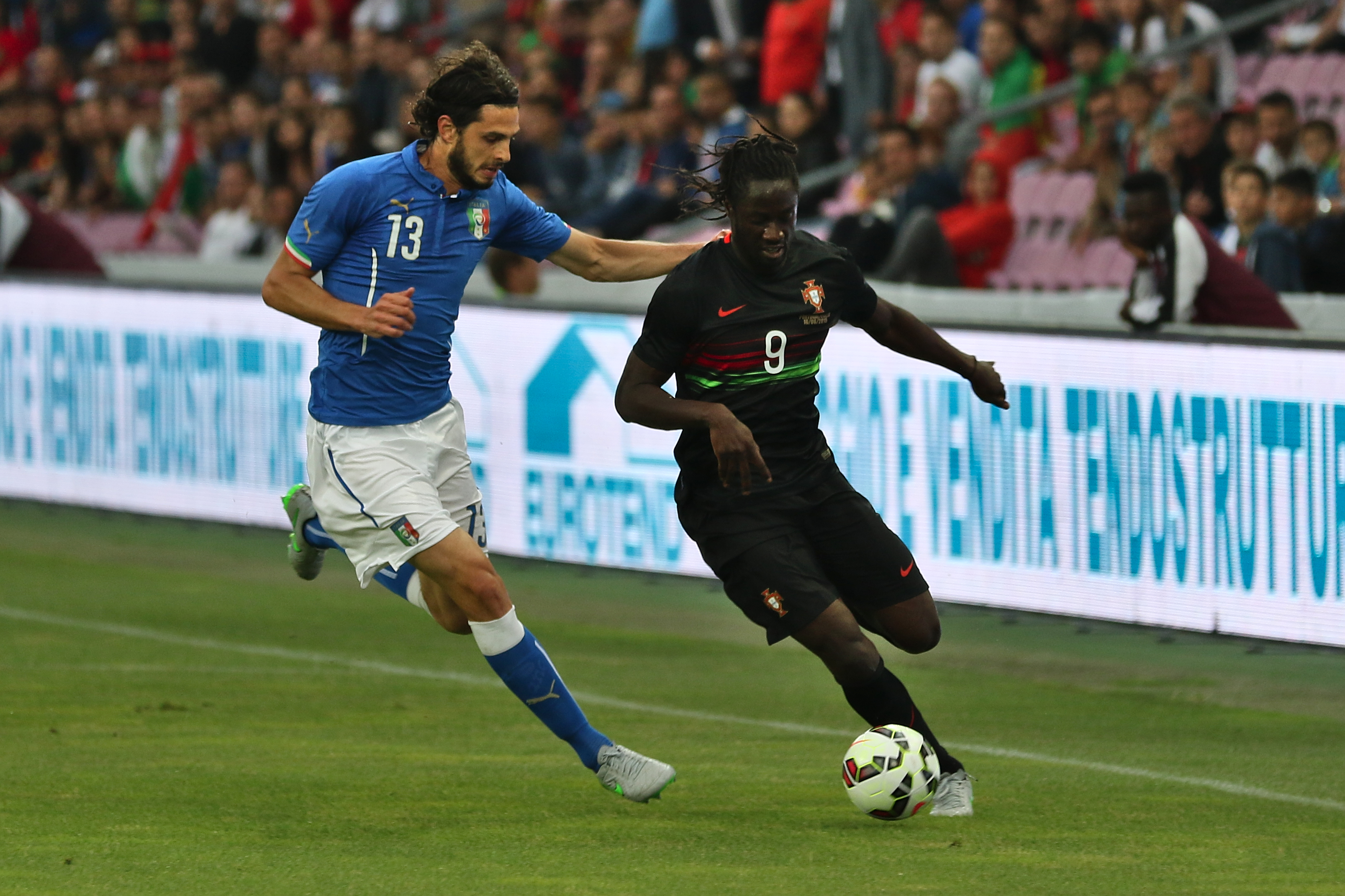 20150616 - Portugal - Italie - Genève - Andrea Ranocchia et Eder